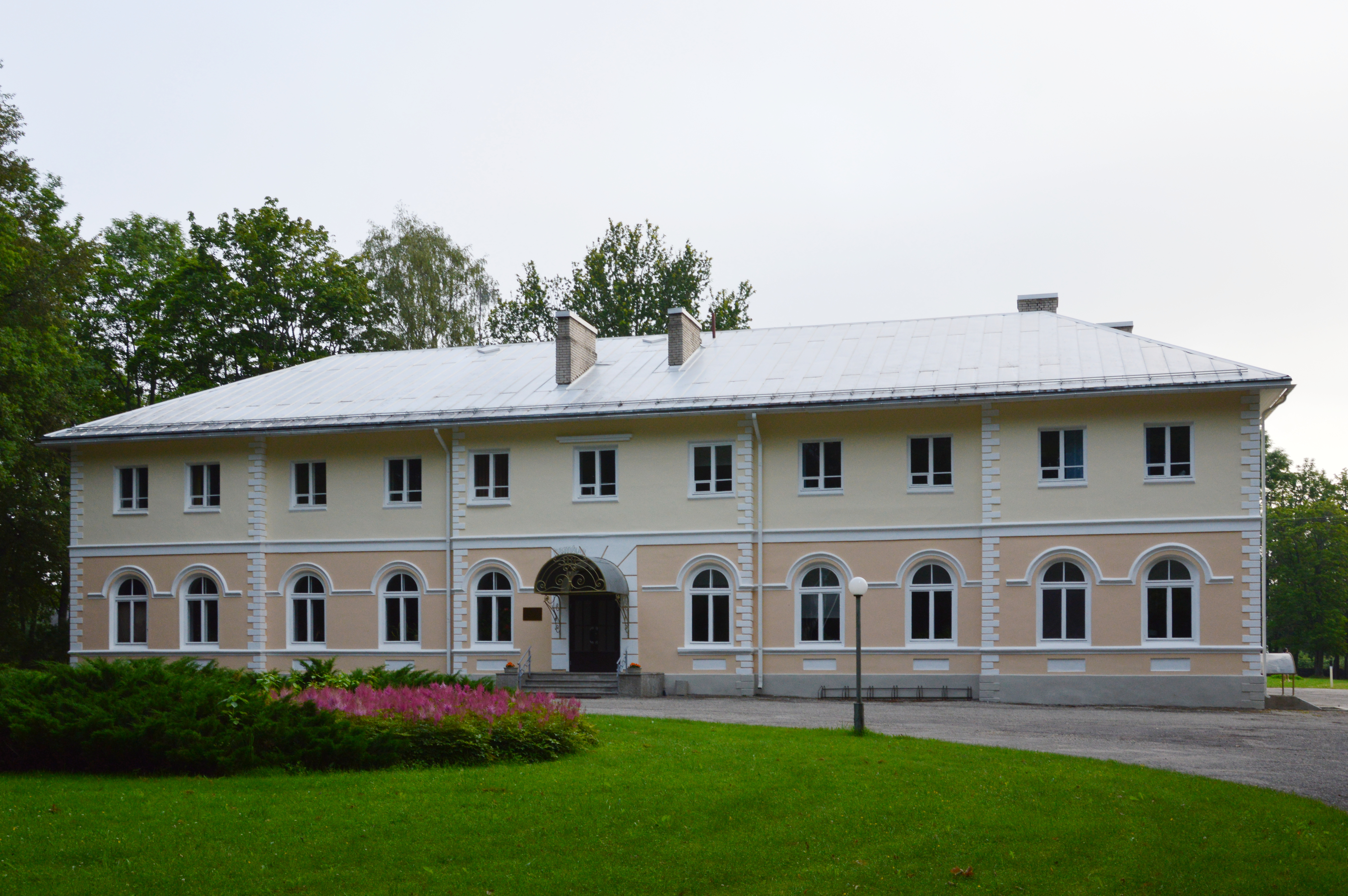 Vastse-Kambja mõisa härrastemaja